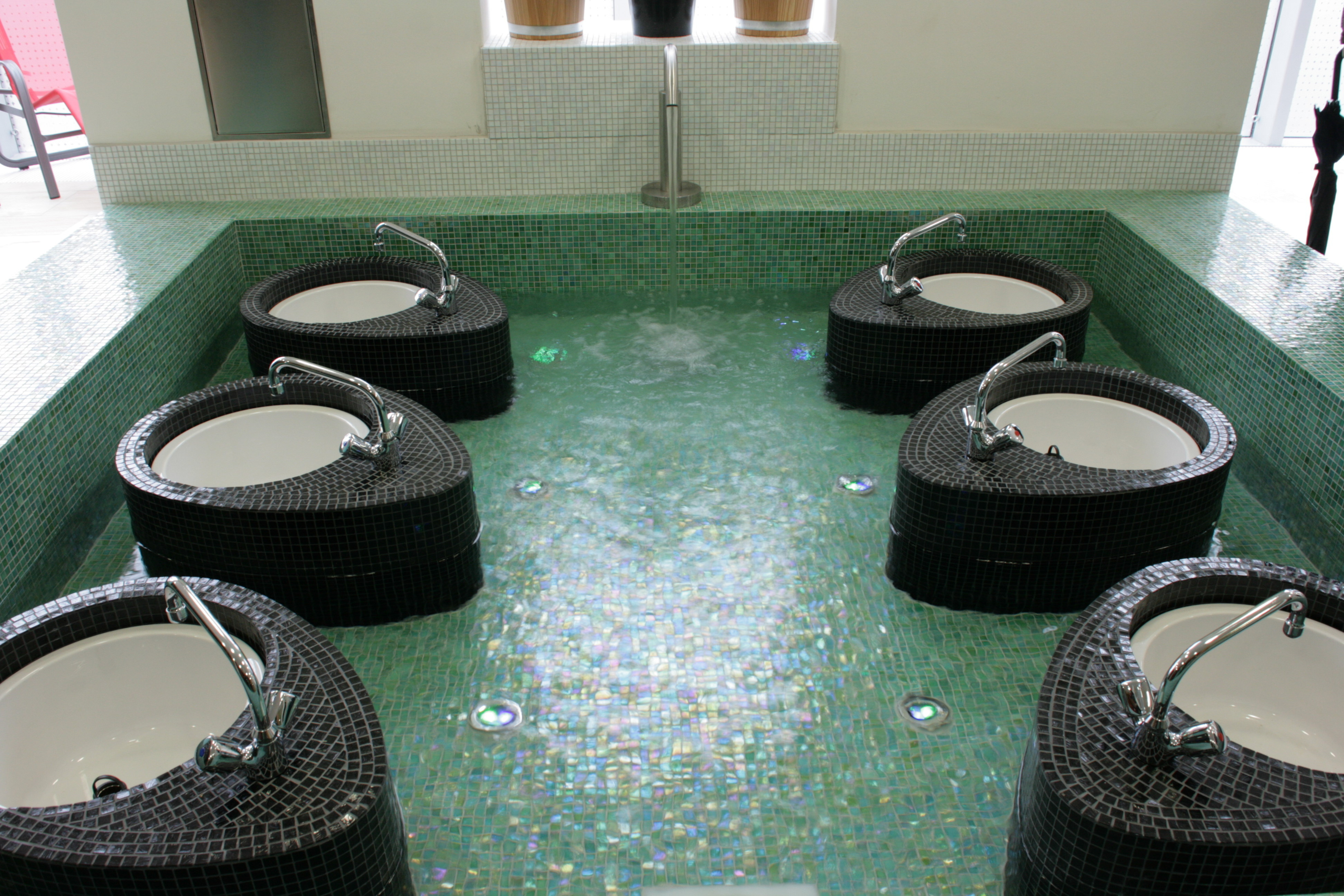 Schwimmoper in Wuppertal am Tag der offenen Tür (26.03.2010) anlässlich der Neueröffnung